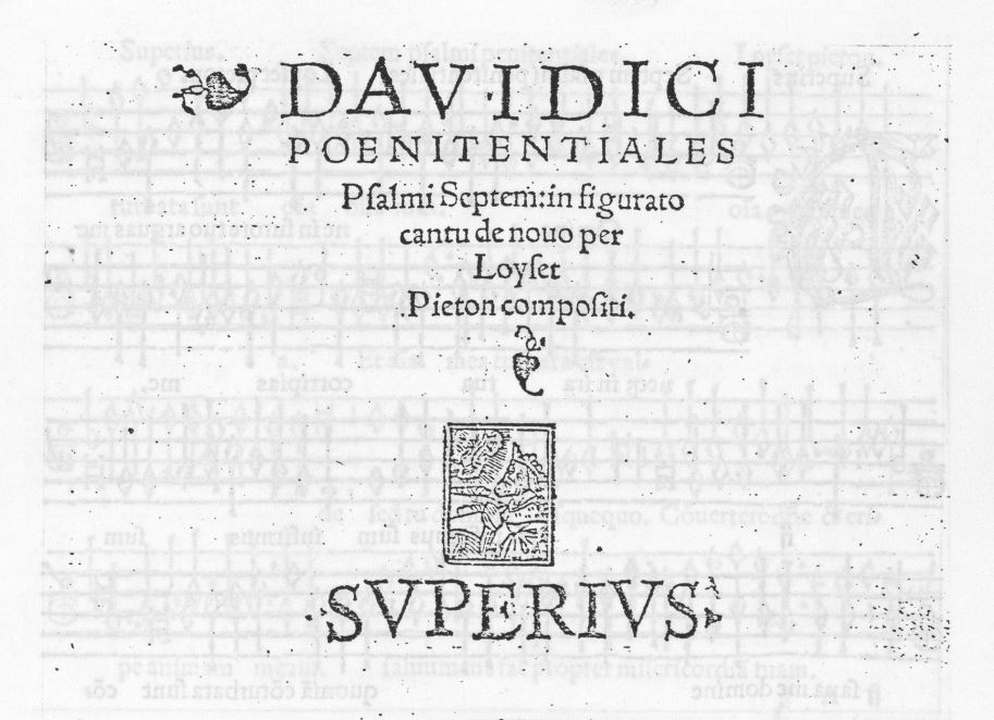 Titla page of Loyset Pieton's Psalmi poenitentiali (Lyon : Jacques Moderne, c. 1530).